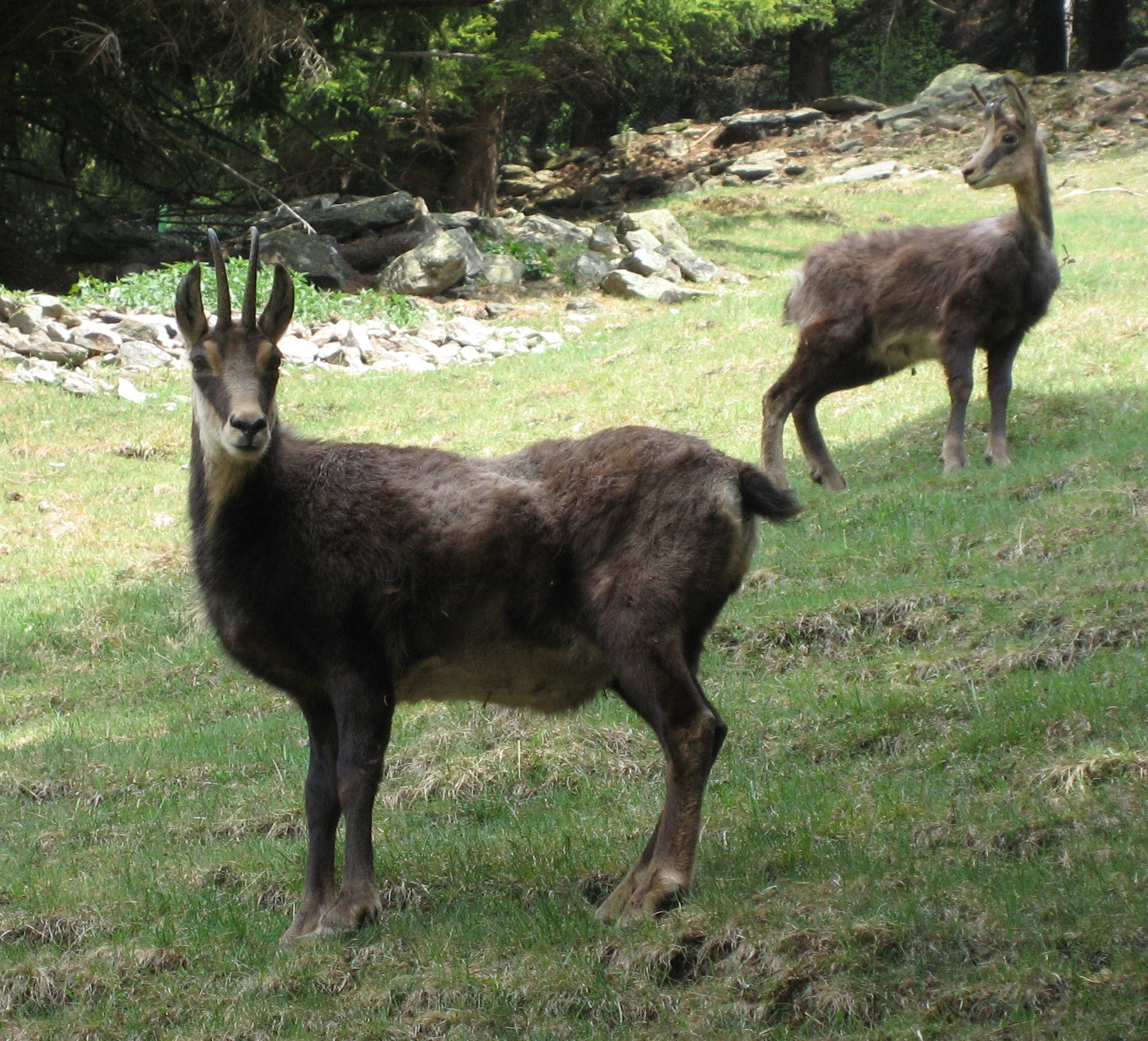 Rupicapra rupicapra in Parc de Merlet (Chamois) Map: 45° 54' 26" N 6° 49' 2" E